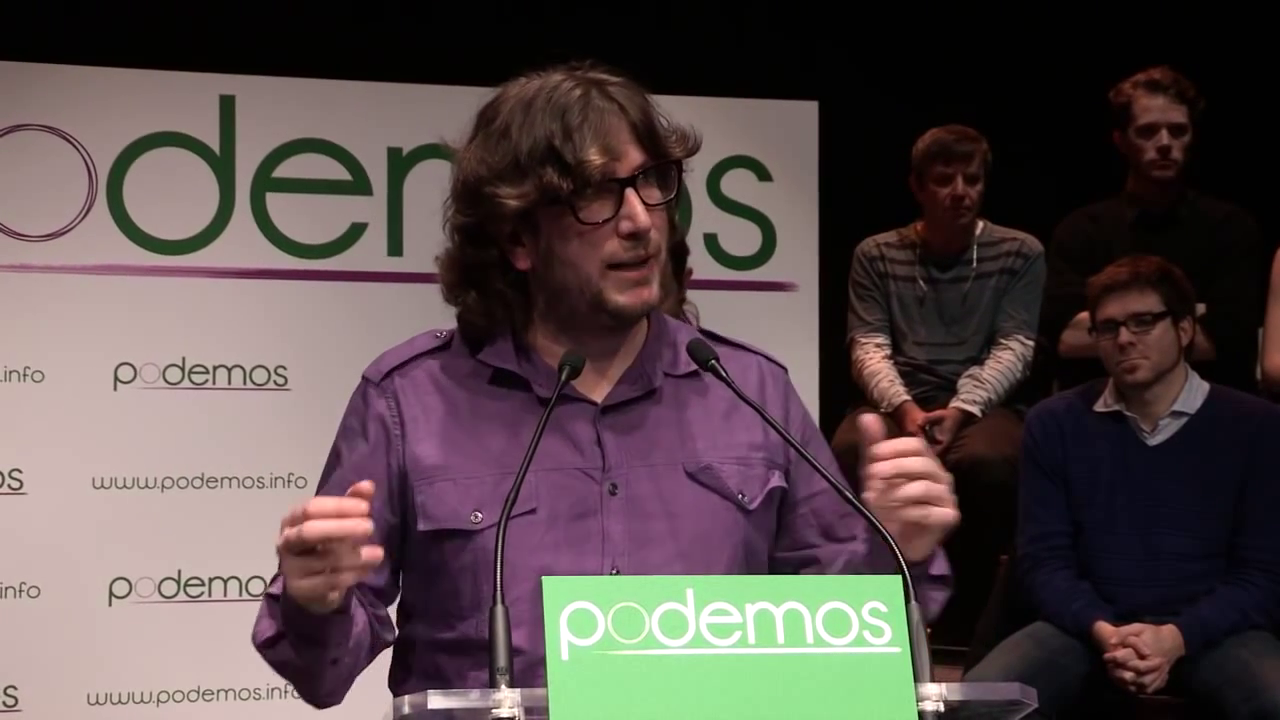 Presentación de Podemos en Madrid (16 de enero de 2014)